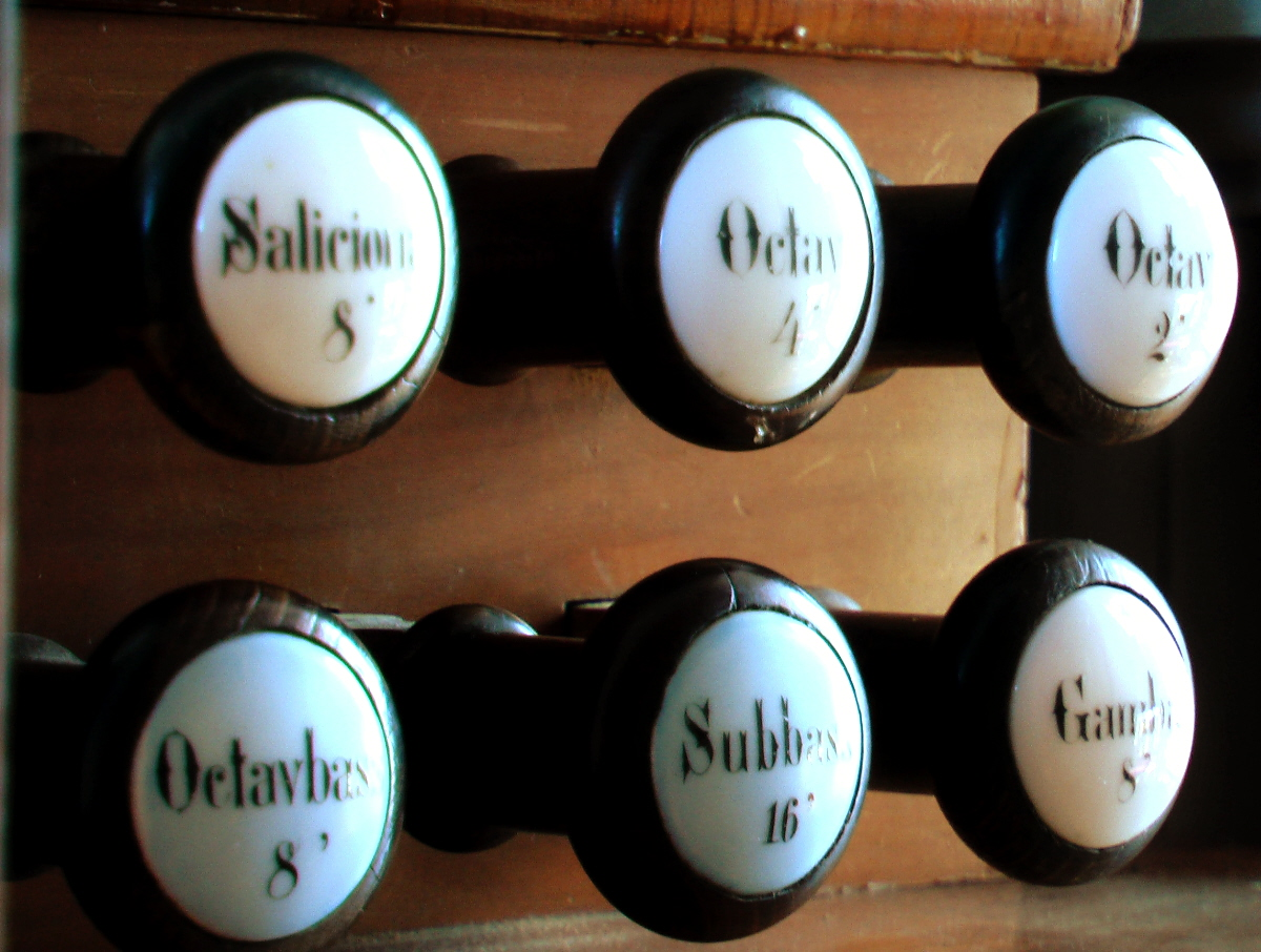 Orgel der Auernheimer St. Georgskirche - Register auf der rechten Seite